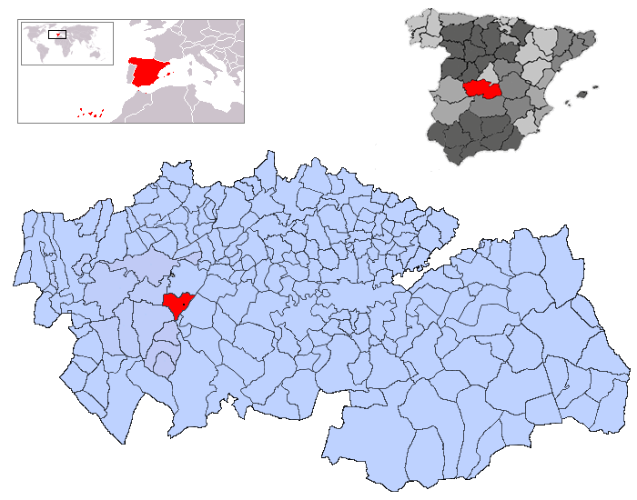 San Bartolomé de las Abiertas en la provincia de Toledo